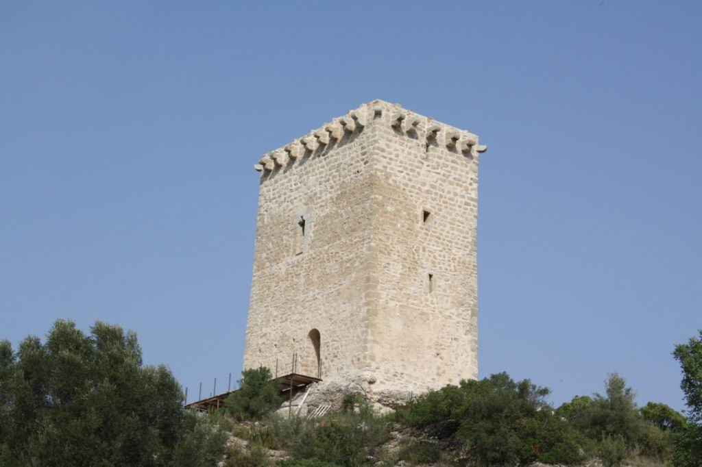 Campredó (Baix Ebre). La torre de Font de Quinto, s. XIII, restaurada.